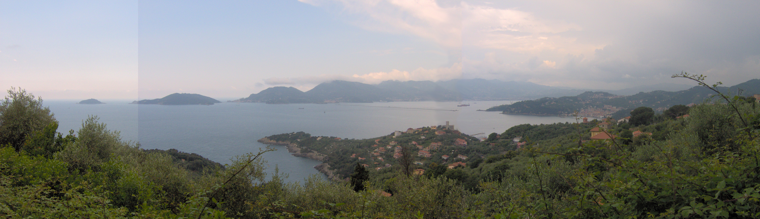 Montaggio di foto del Golfo della Spezia